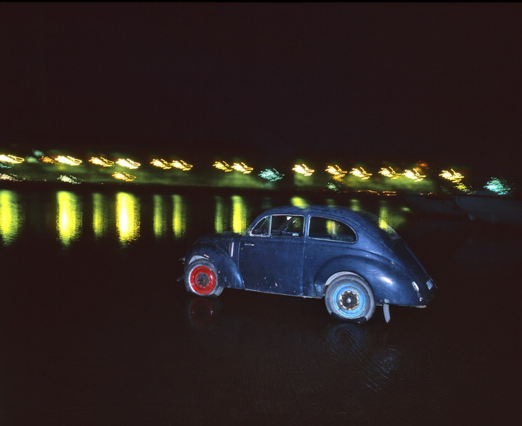 ONI & V NOCI – Fotografie z raných osmdesátých. Photograph from Jiří Poláček´s archive.